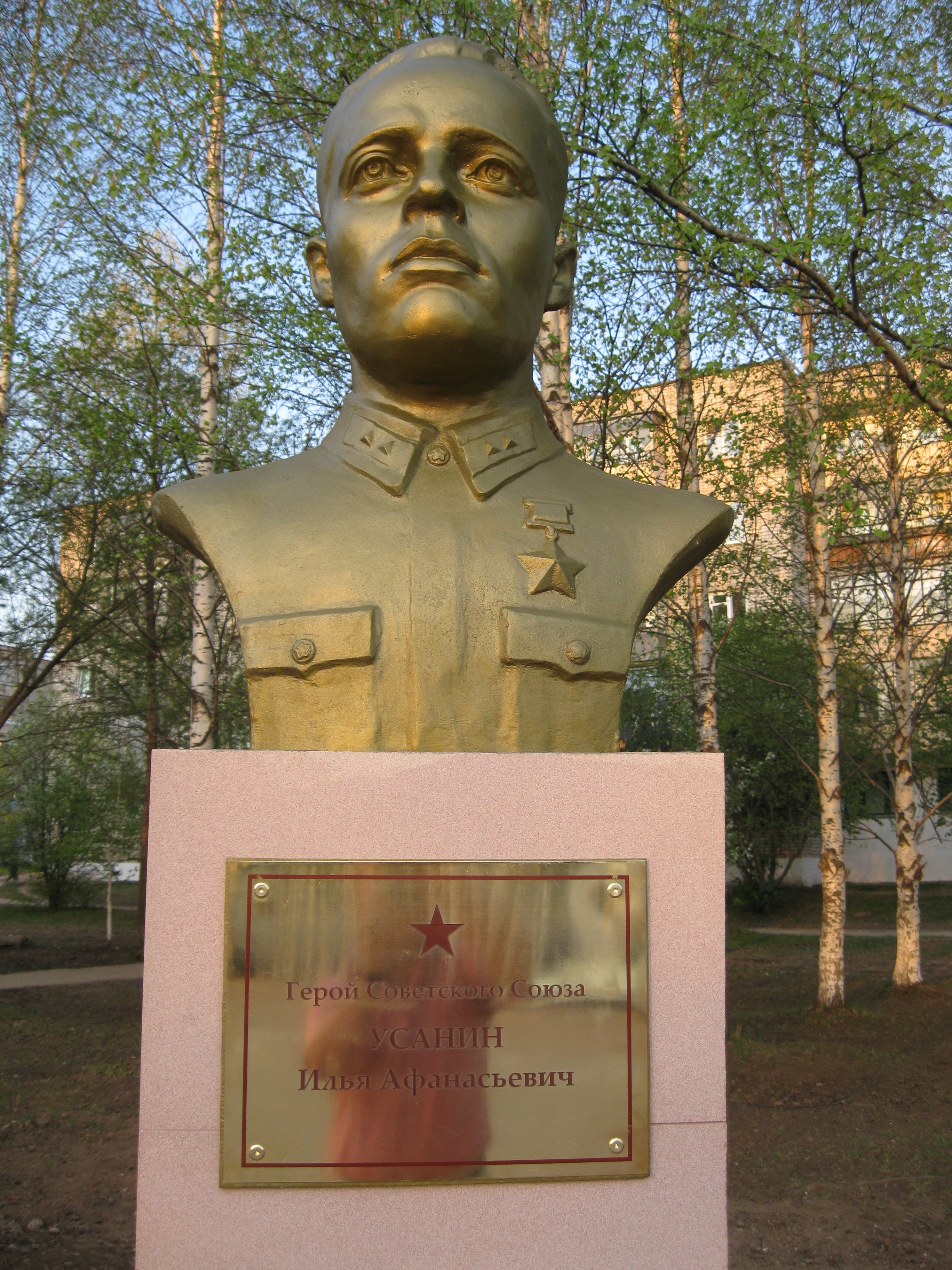 Бюст Ильи Афанасьевича Усанина на Аллее Славы, открытой 09.05.2010 года в городе Чернушка.